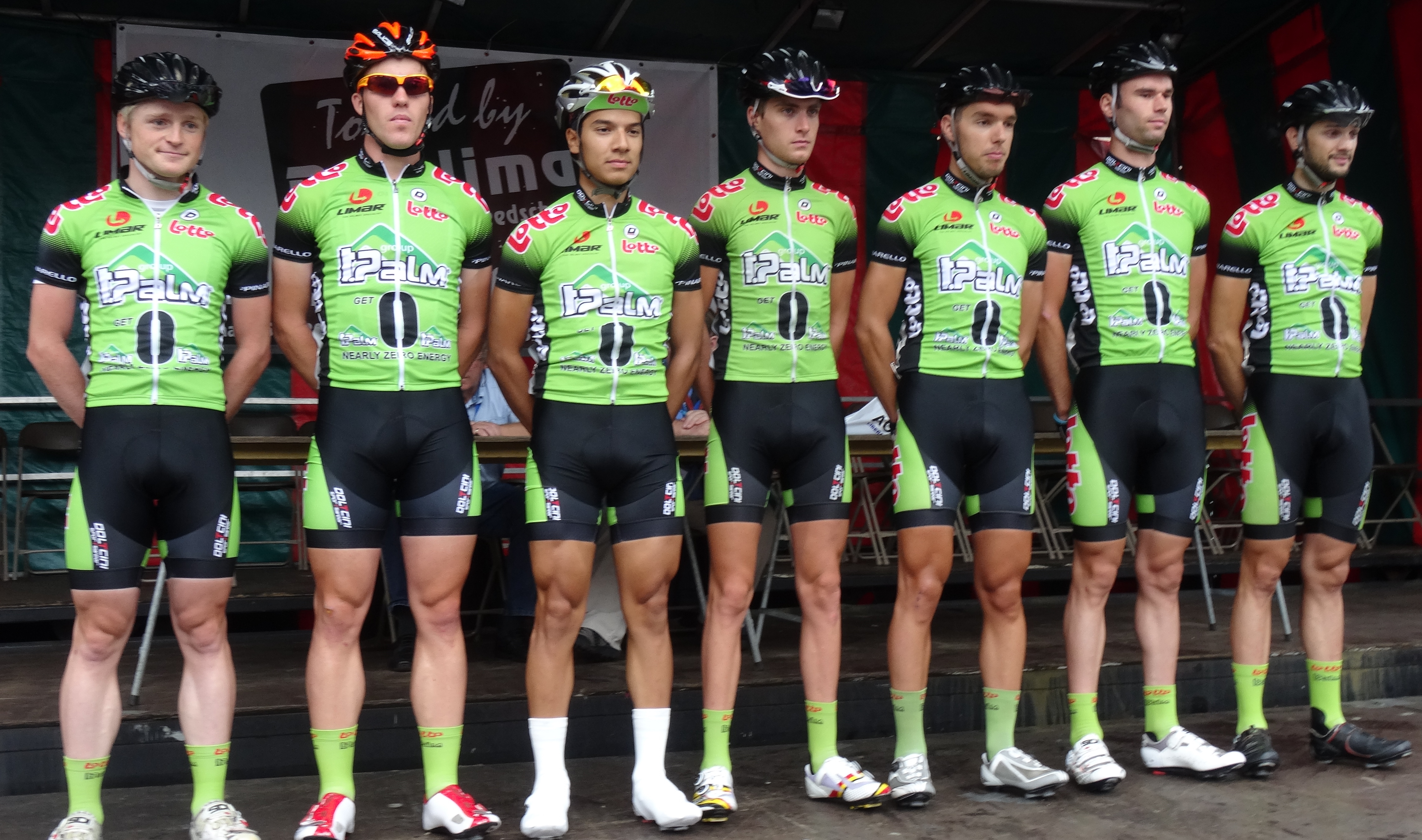 Reportage photographique réalisé le dimanche 10 août à l'occasion du départ et de l'arrivée de la Flèche du port d'Anvers 2014 à Merksem (Anvers), Belgique.